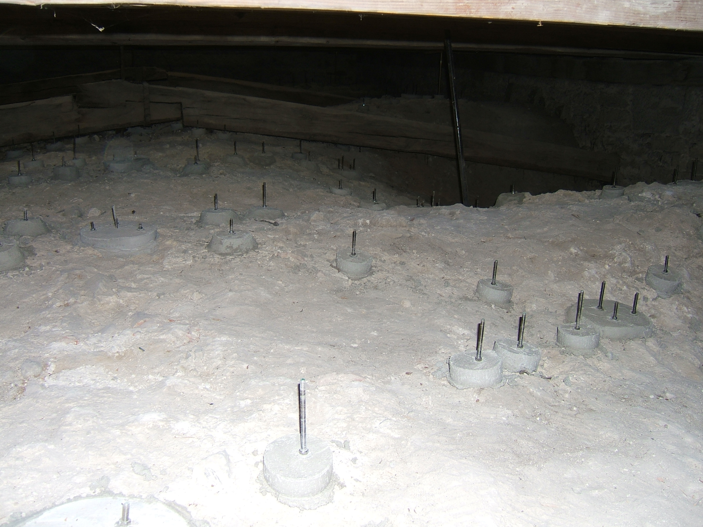 St.-Veit-Kirche Gärtringen, Gewölbe des Langhauses von oben mit Gewindeankern zur Befestigung des Rippenwerks